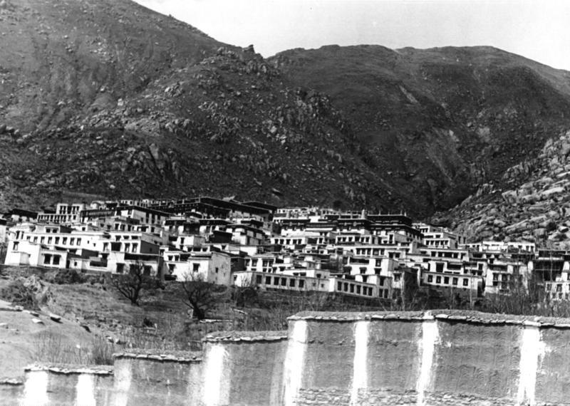 Lhasa, das Kloster Drepung